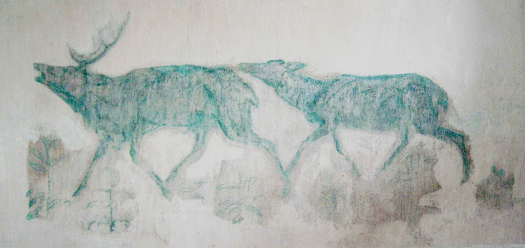 Fresko von Franz Marc mit grün-blauen Hirschen, gemalt im Zeitraum 1904 bis 1908 auf der Bergstaffelalm in Jachenau.